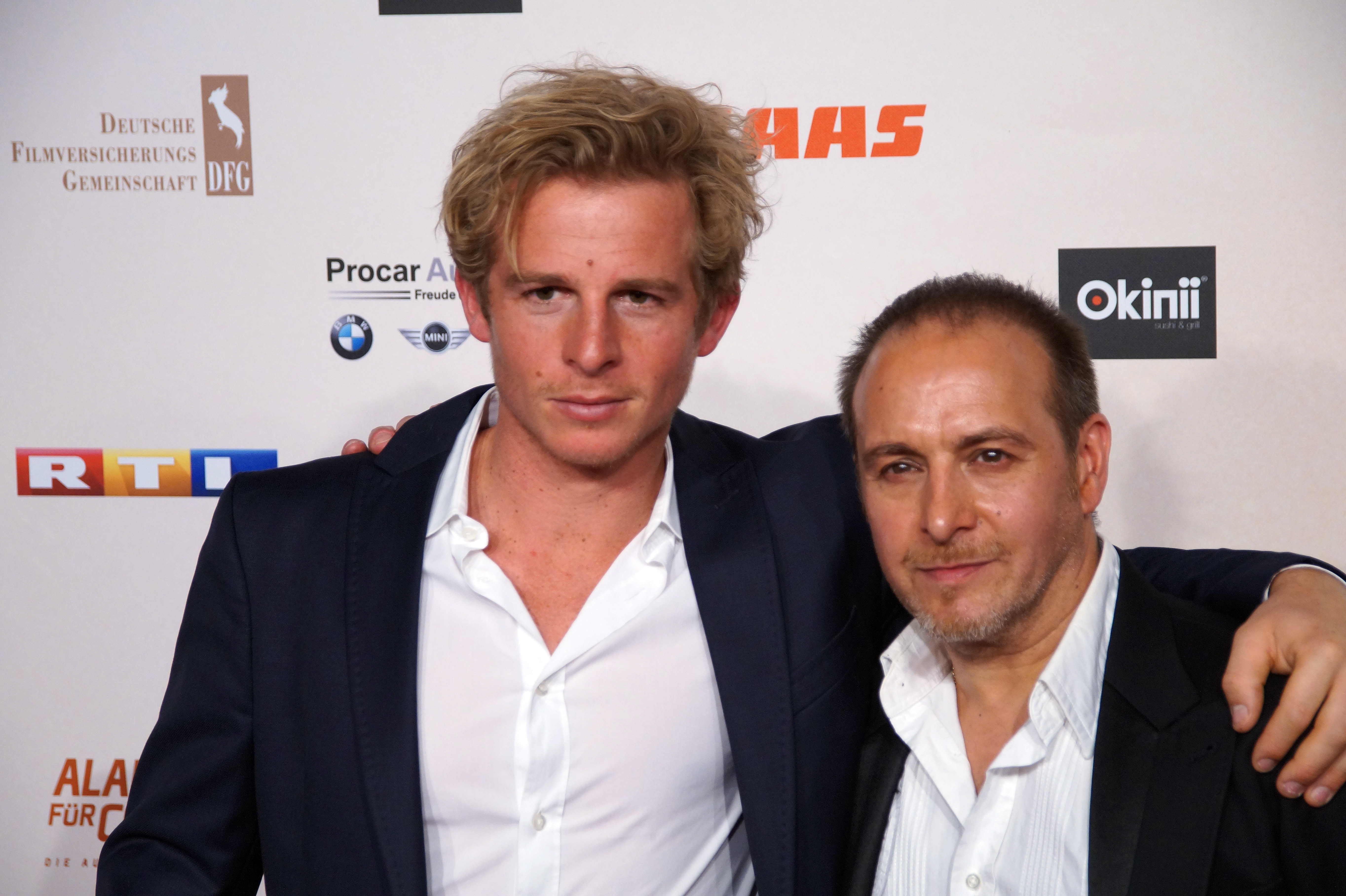 Daniel Roesner & Erdogan Atalay bei der Premiere von der 300. Folge 'Alarm für Cobra 11', April 2016.